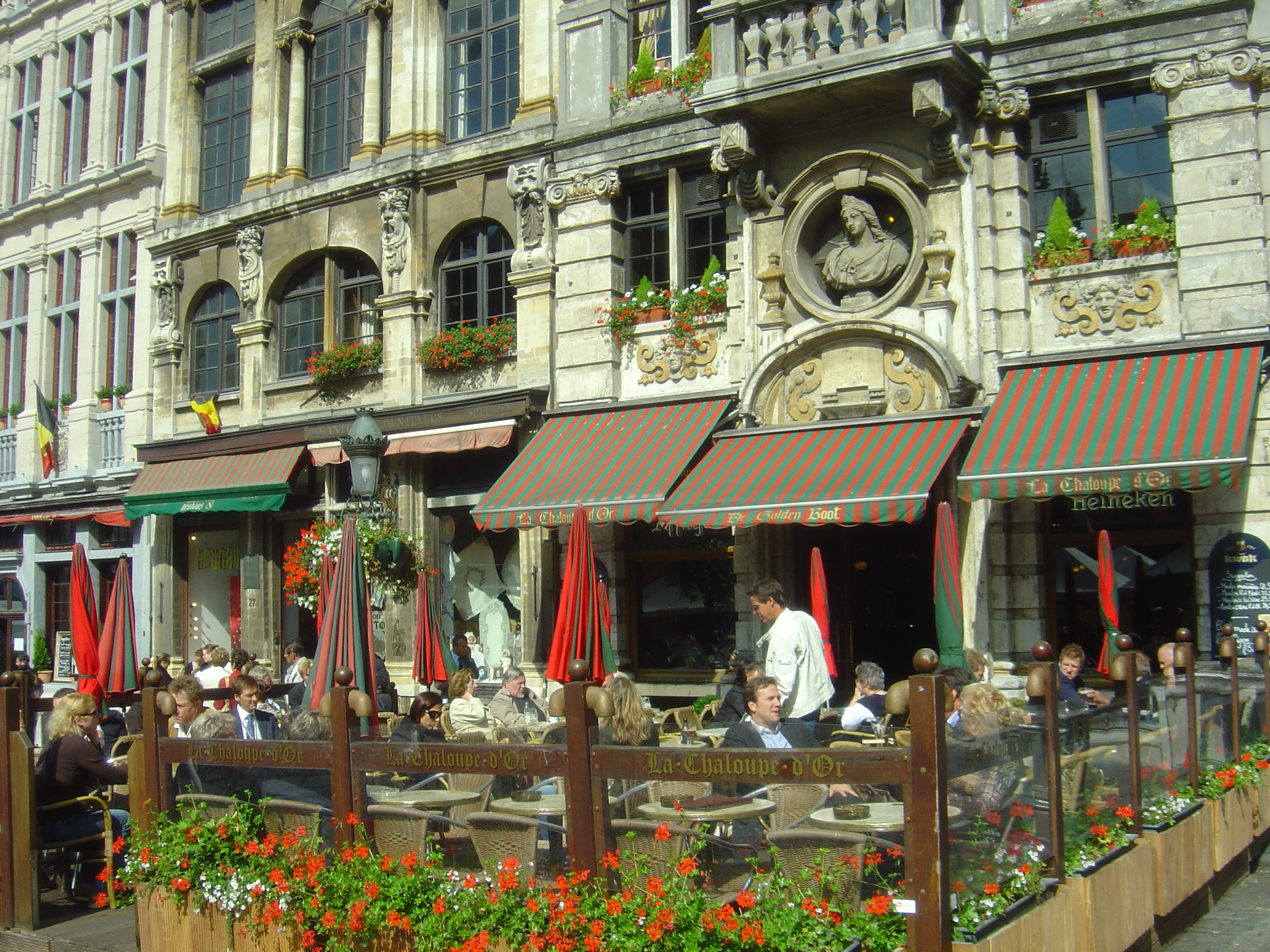 Γκραν Πλας, Βρυξέλλες, Οίκος της "Χρυσής Λέμβου